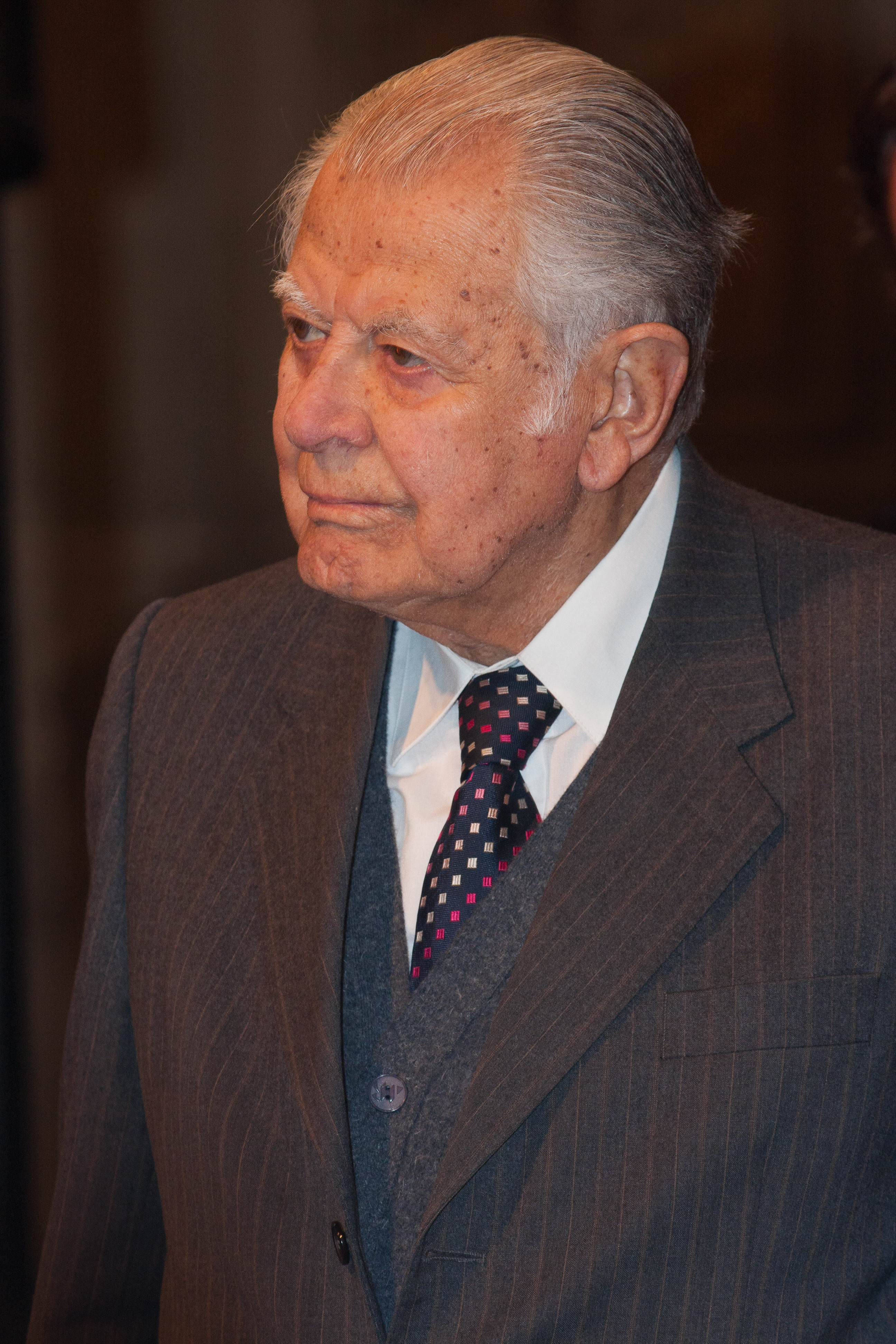 Patricio Aylwin Azócar (n. Viña del Mar, 26 de noviembre de 1918) es un político democratacristiano y jurista chileno. Fue presidente del Senado de 1971 a 1972 y primer mandatario de su país durante el periodo comprendido entre 1990 y 1994. Aylwin fue el primer presidente democráticamente electo tras el golpe de Estado del 11 de septiembre de 1973, en el que fue derrocado Salvador Allende y se instauró la dictadura de Augusto Pinochet. Así, el mandato de Aylwin dio inicio al periodo conocido como la Transición y el primero de los cuatro gobiernos consecutivos de la Concertación de Partidos por la Democracia.